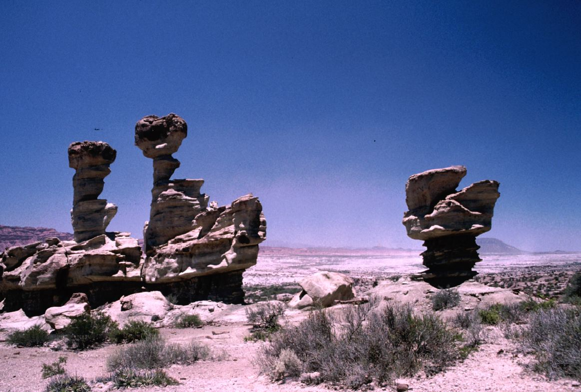 Steinformationen in Ischigualasto, Argentinien